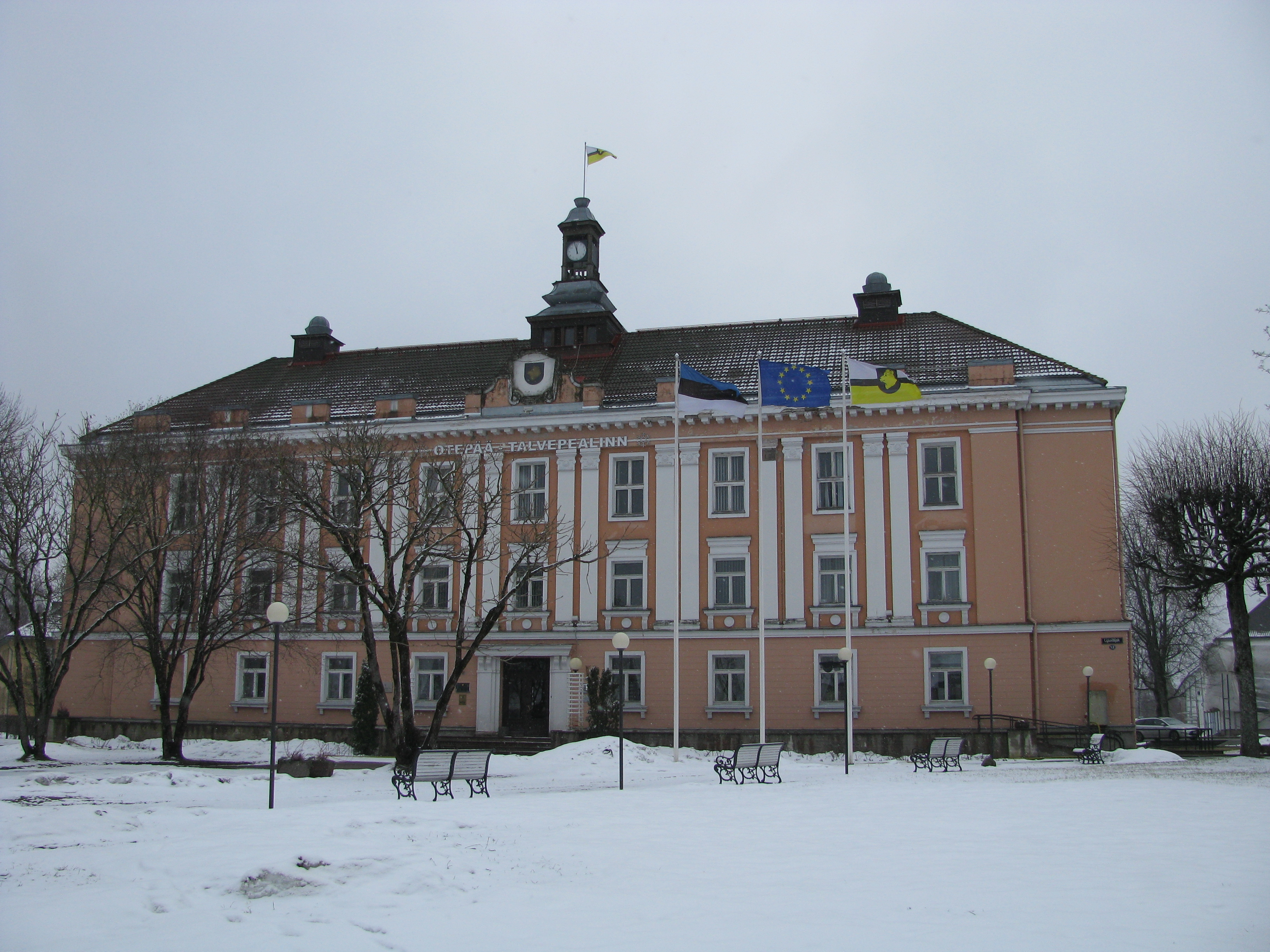 Otepää vallavalitsuse hoone